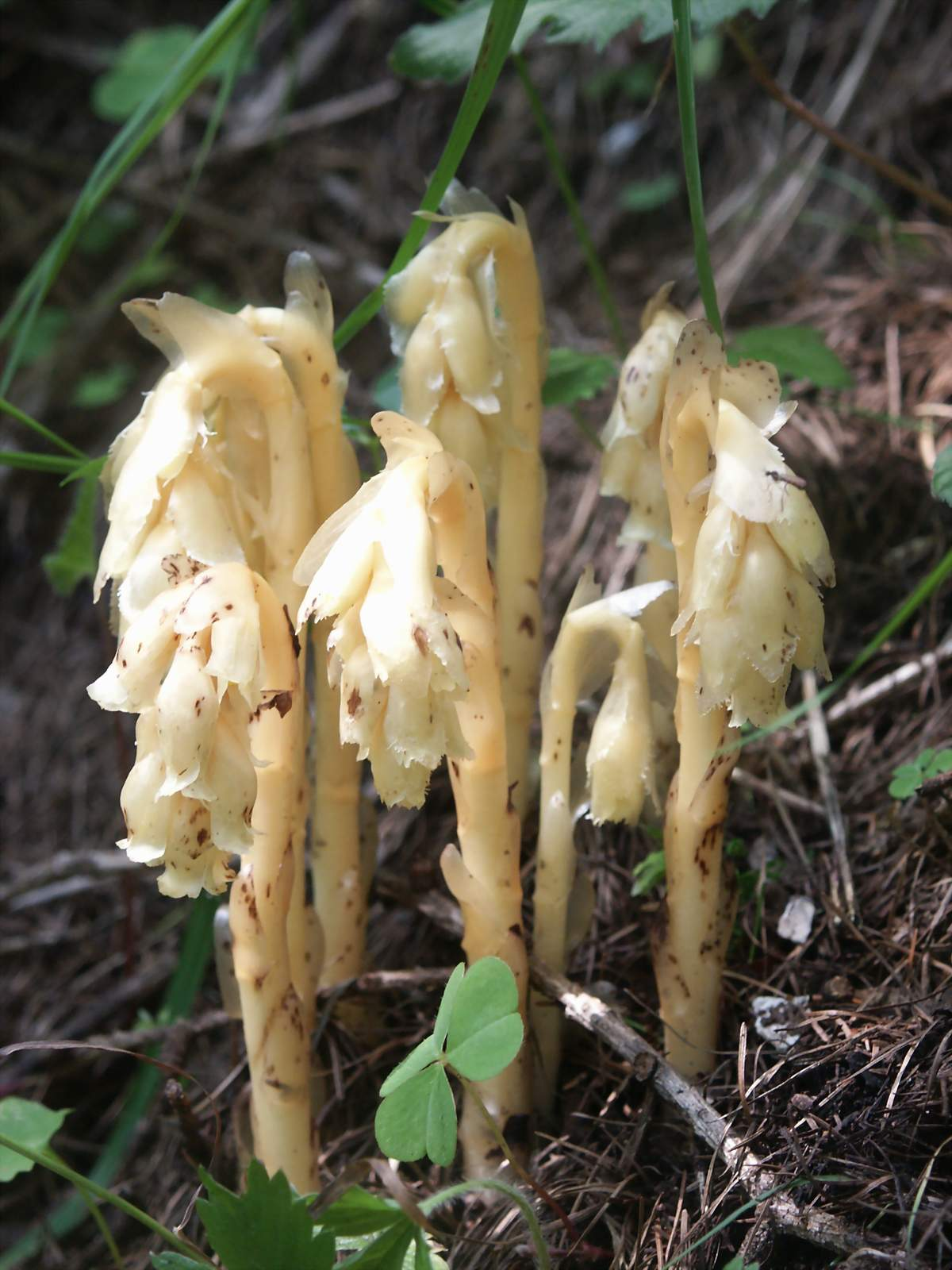 Monotropa hypopitys, Berchtesgadender Alpen, Germany